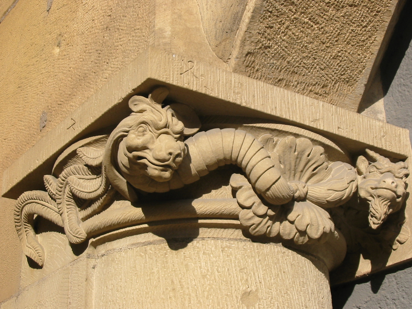 Kapitell Fleisch- und Gerichtshaus in Heilbronn